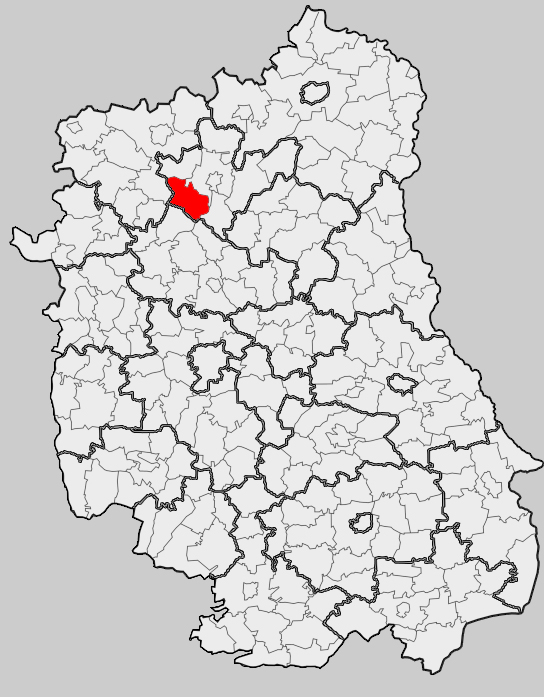 Map of gmina Borki, Radzyń Podlaski county, Lublin voivodship Mapa gminy Borki, powiat radzyński, województwo lubelskie